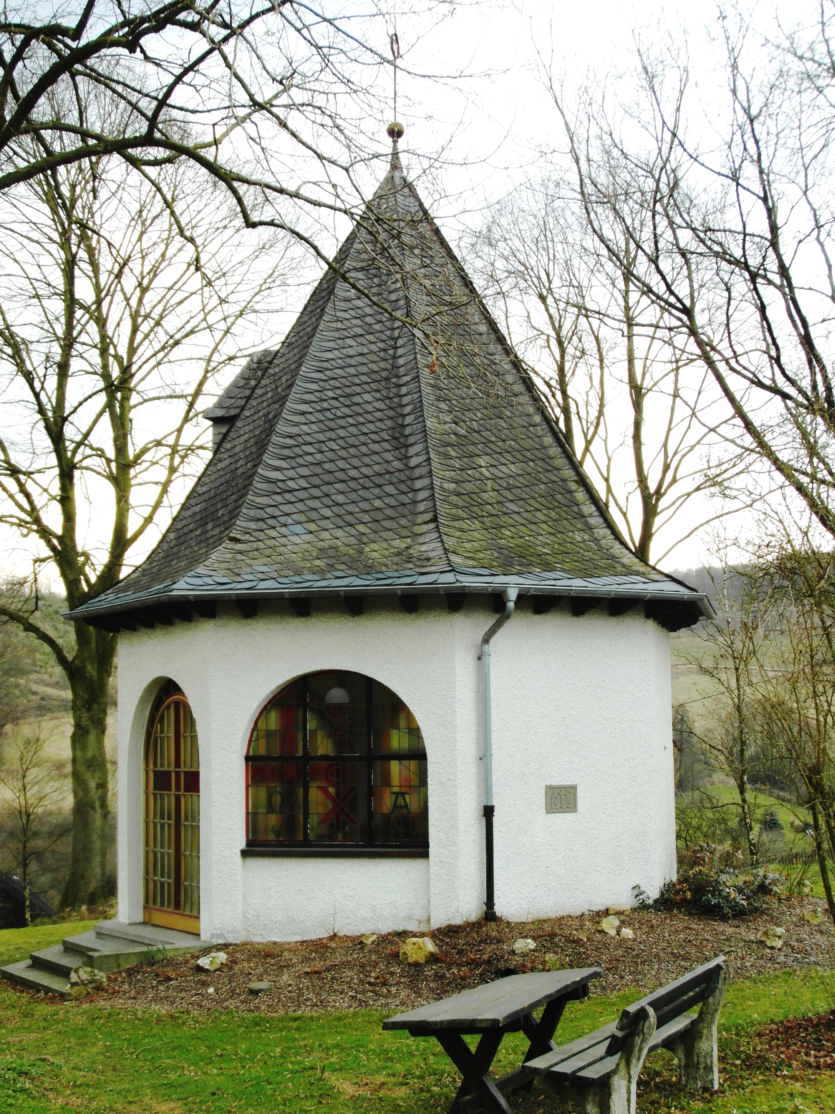 Im Jahr 1955 errichtete Marienkapelle Auf dem Kippel in Grvenbrück